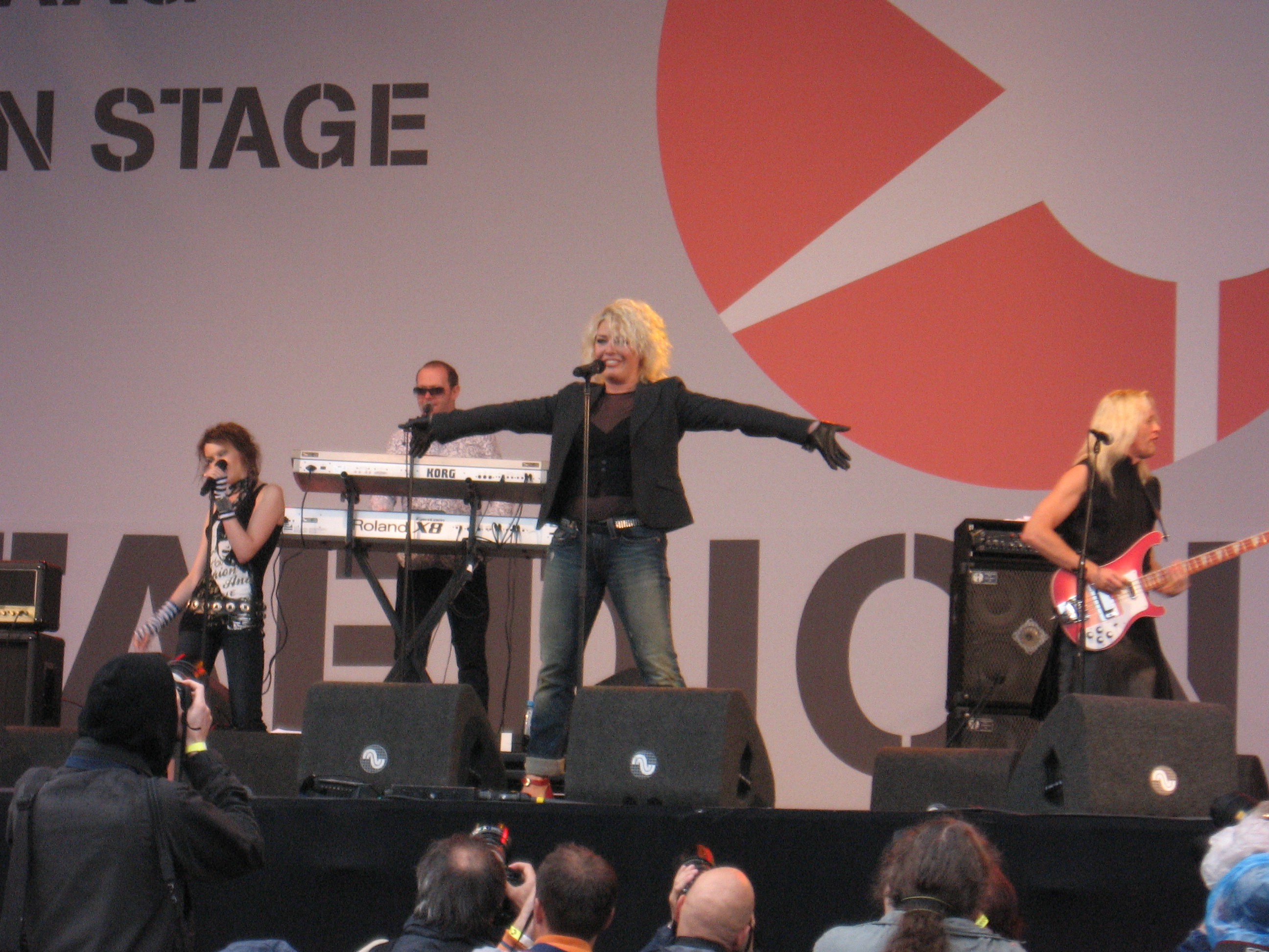 Kim Wilde, Parkpop 2007, Den Haag